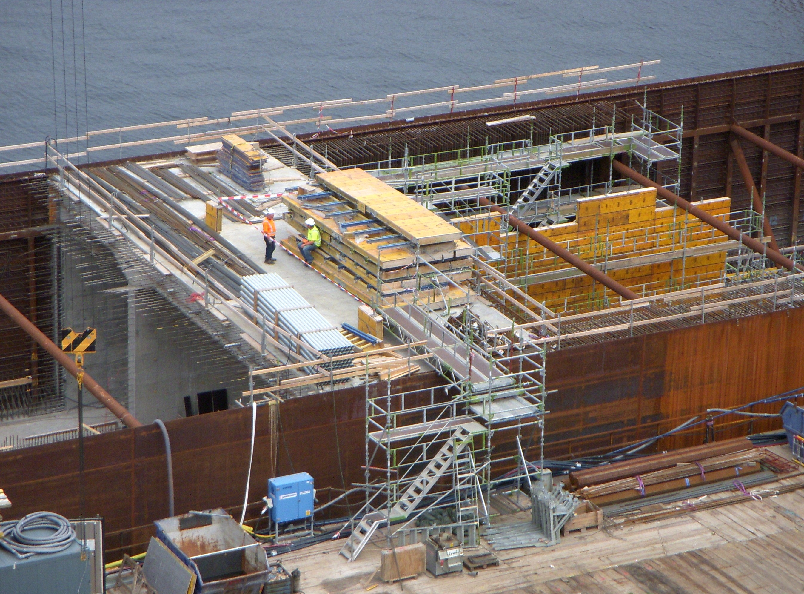 Södertunnelns sänktunnelavsnitt i Stockholm